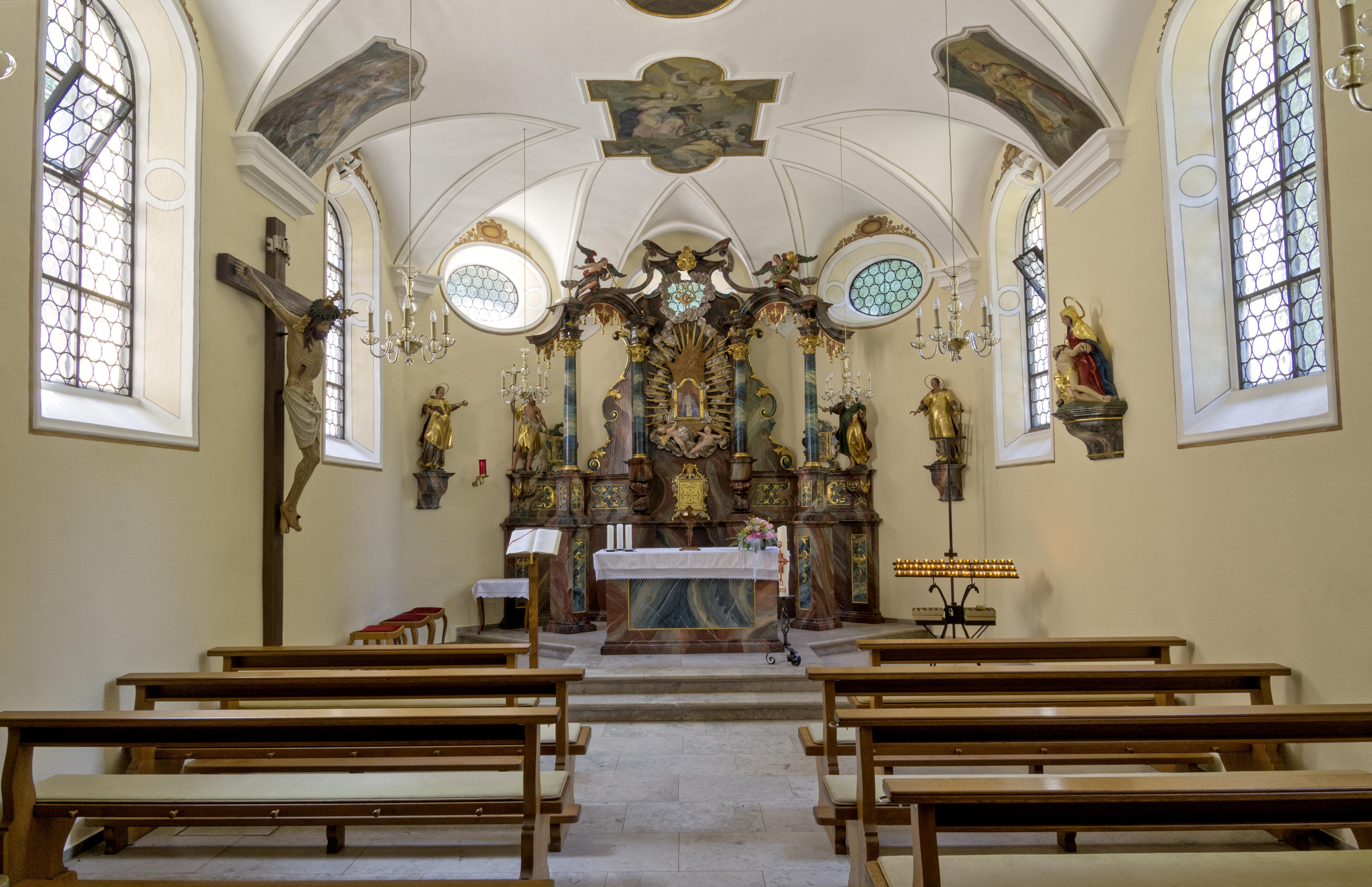 Bilder von der Giersbergkapelle